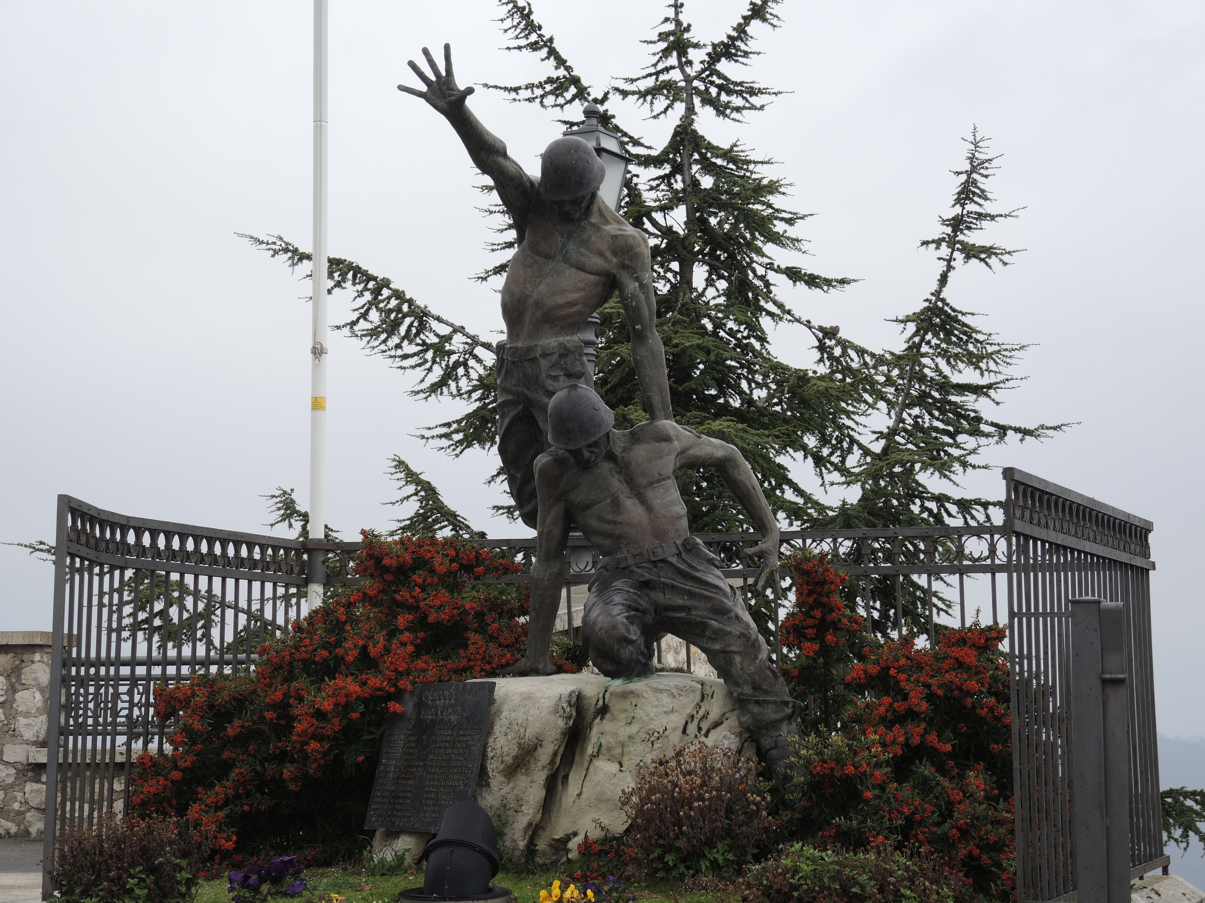 Oricola